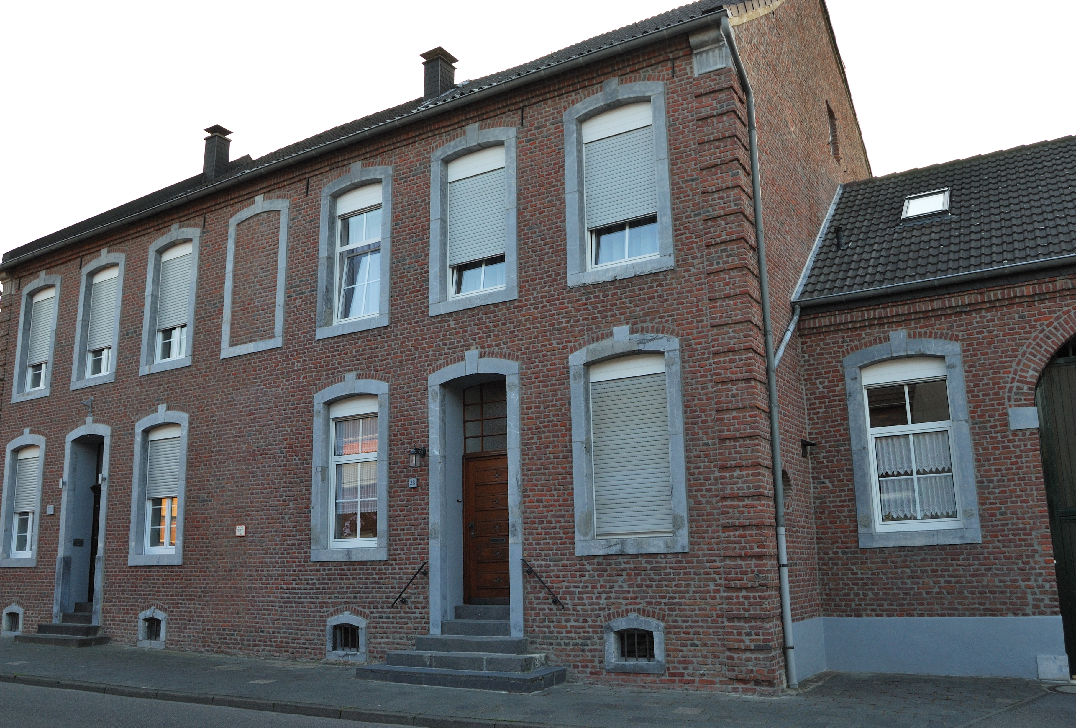 Fortunastraße 28/30; Denkmalnummer 164 This is a photograph of an architectural monument.